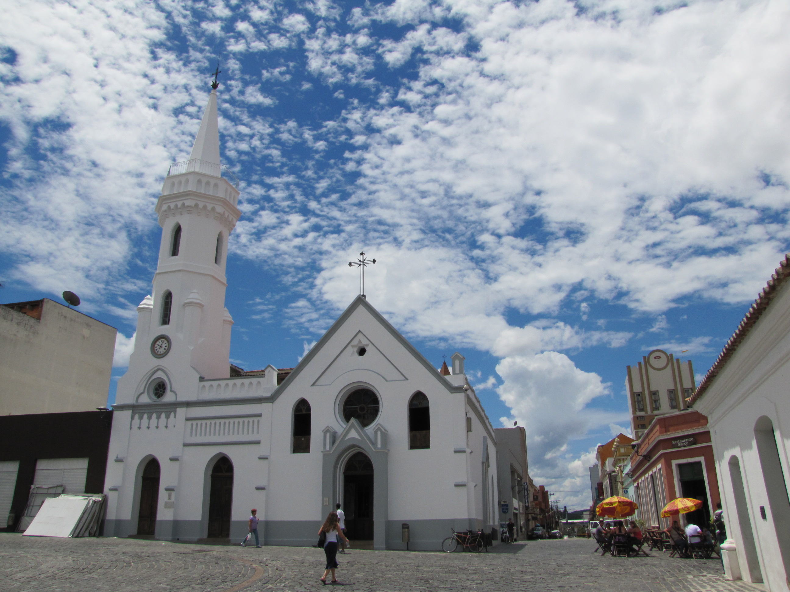 Igreja da Ordem Terceira de São Francisco das Chagas, Curitiba, Paraná, Brasil.